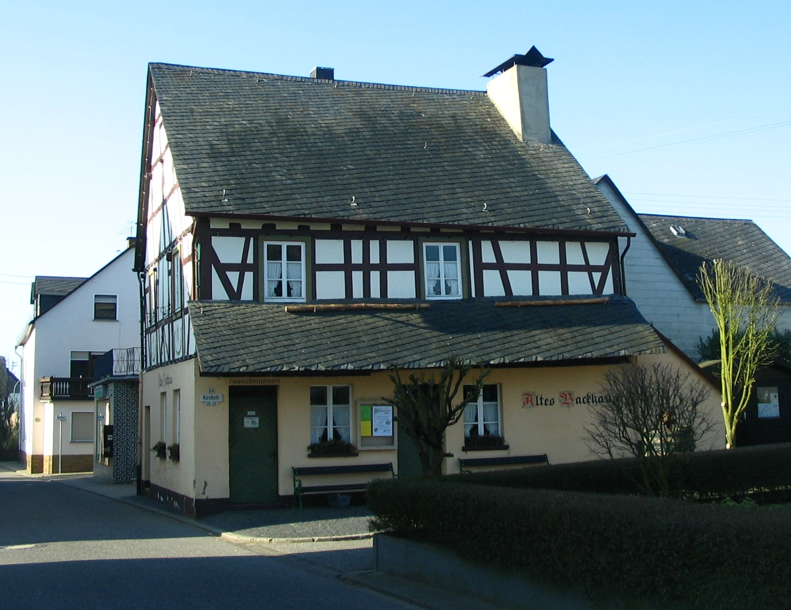 Mörsdorf im Hunsrück - das alte Backhaus dient heute als Heimatmuseum